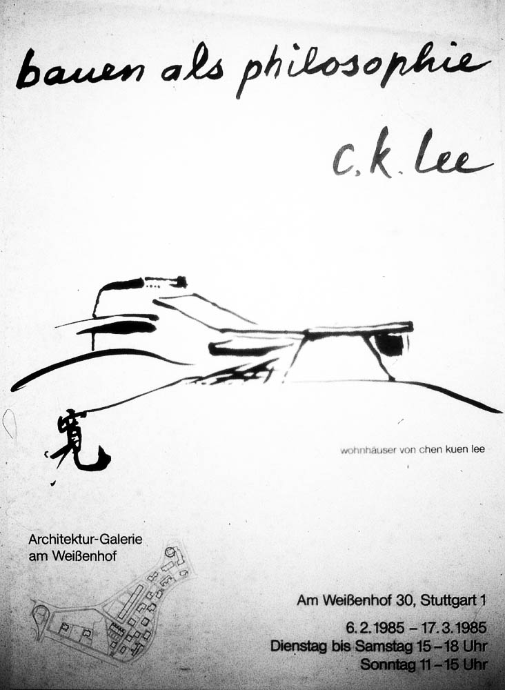 李承寬展覽海報